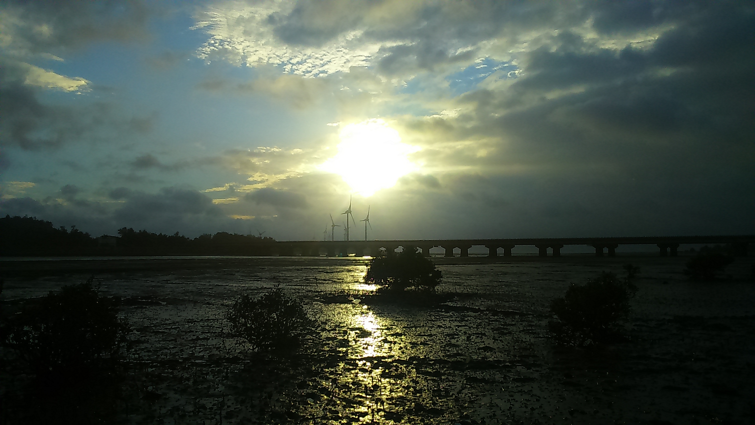 中港溪出海口北岸夕陽